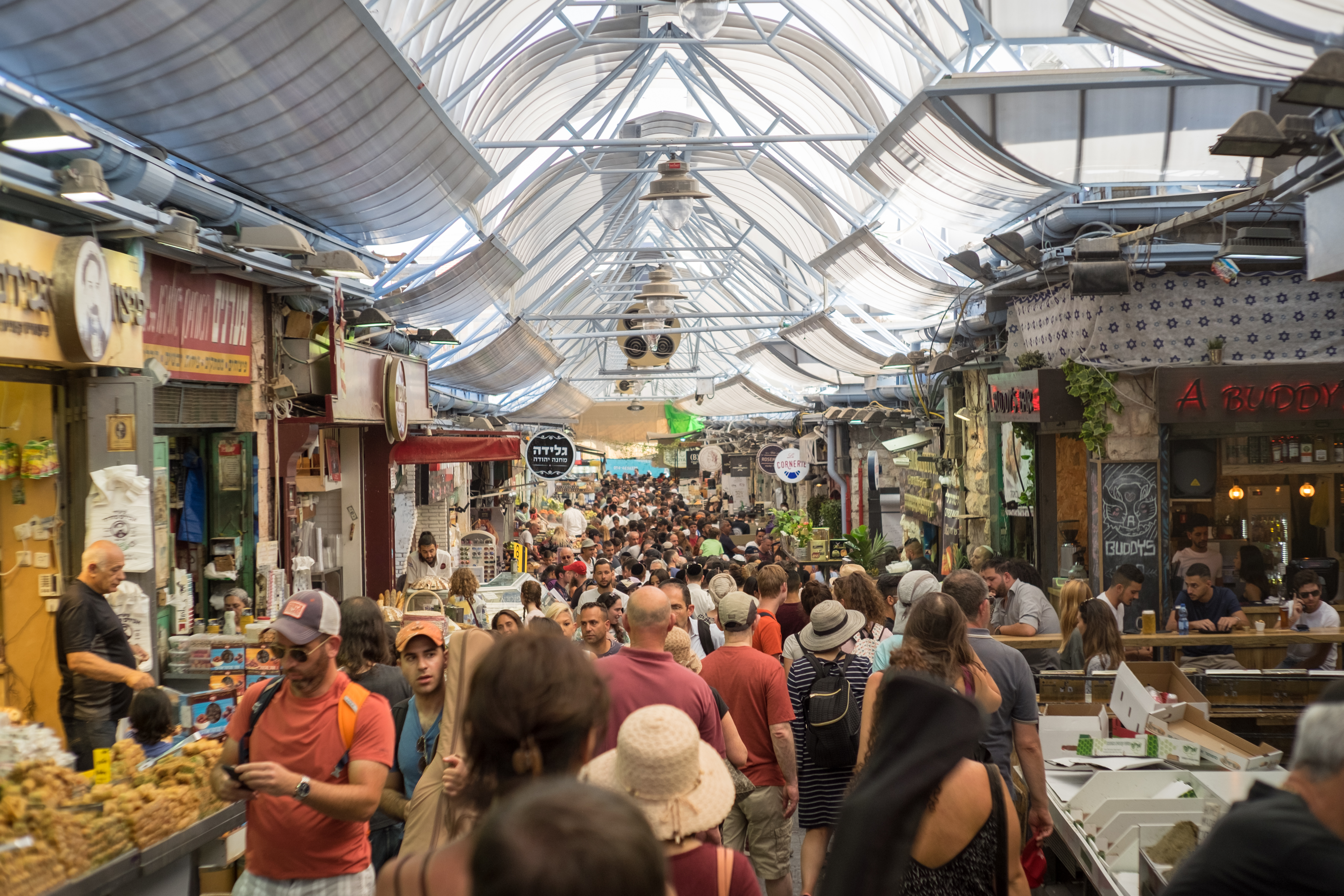 Mahane Yehuda (I)